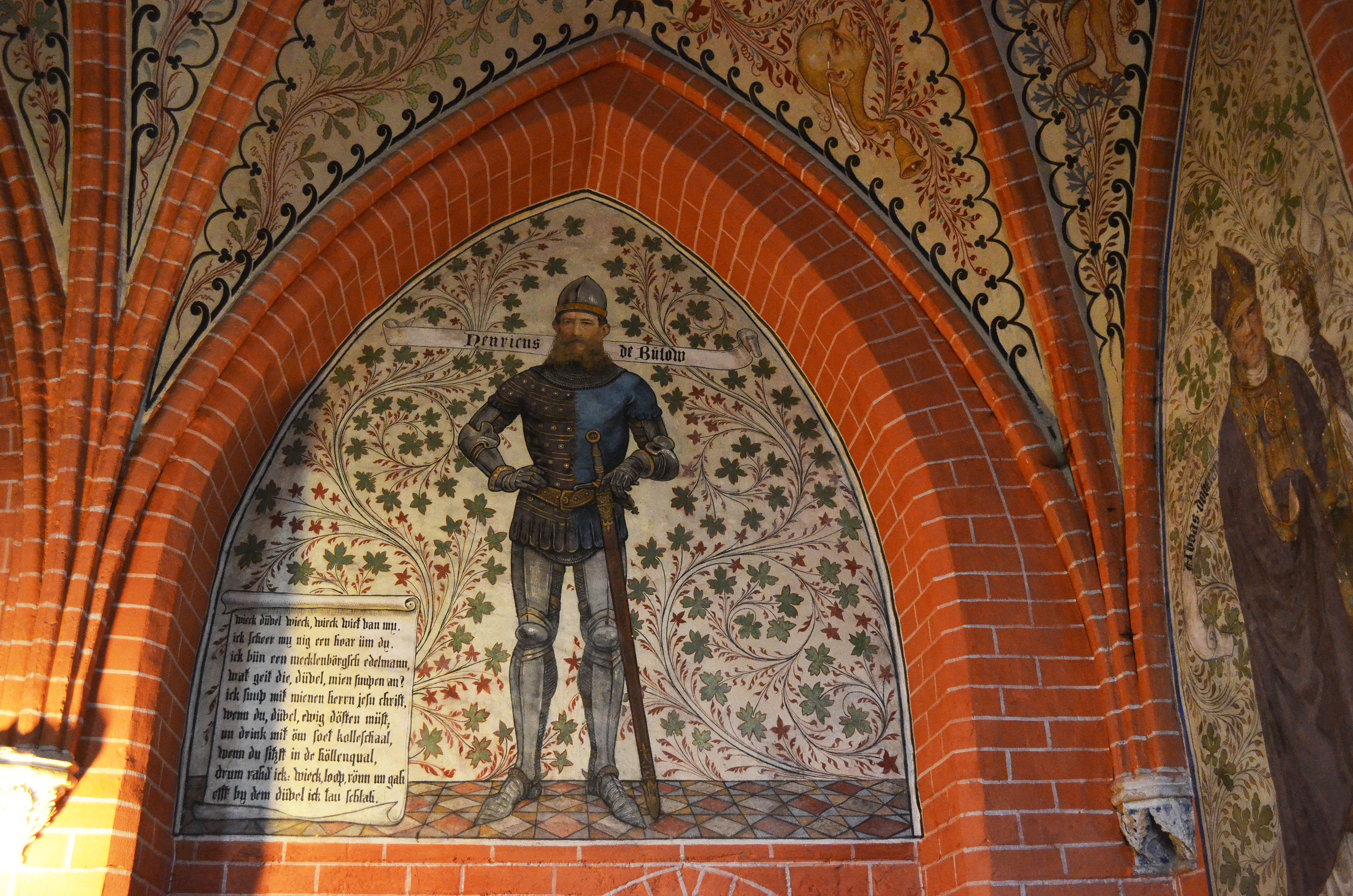 Bad Doberan, Münster, Bülow Kapelle mit historischer Ausmalung von Carl Andreae, 1873 6,6